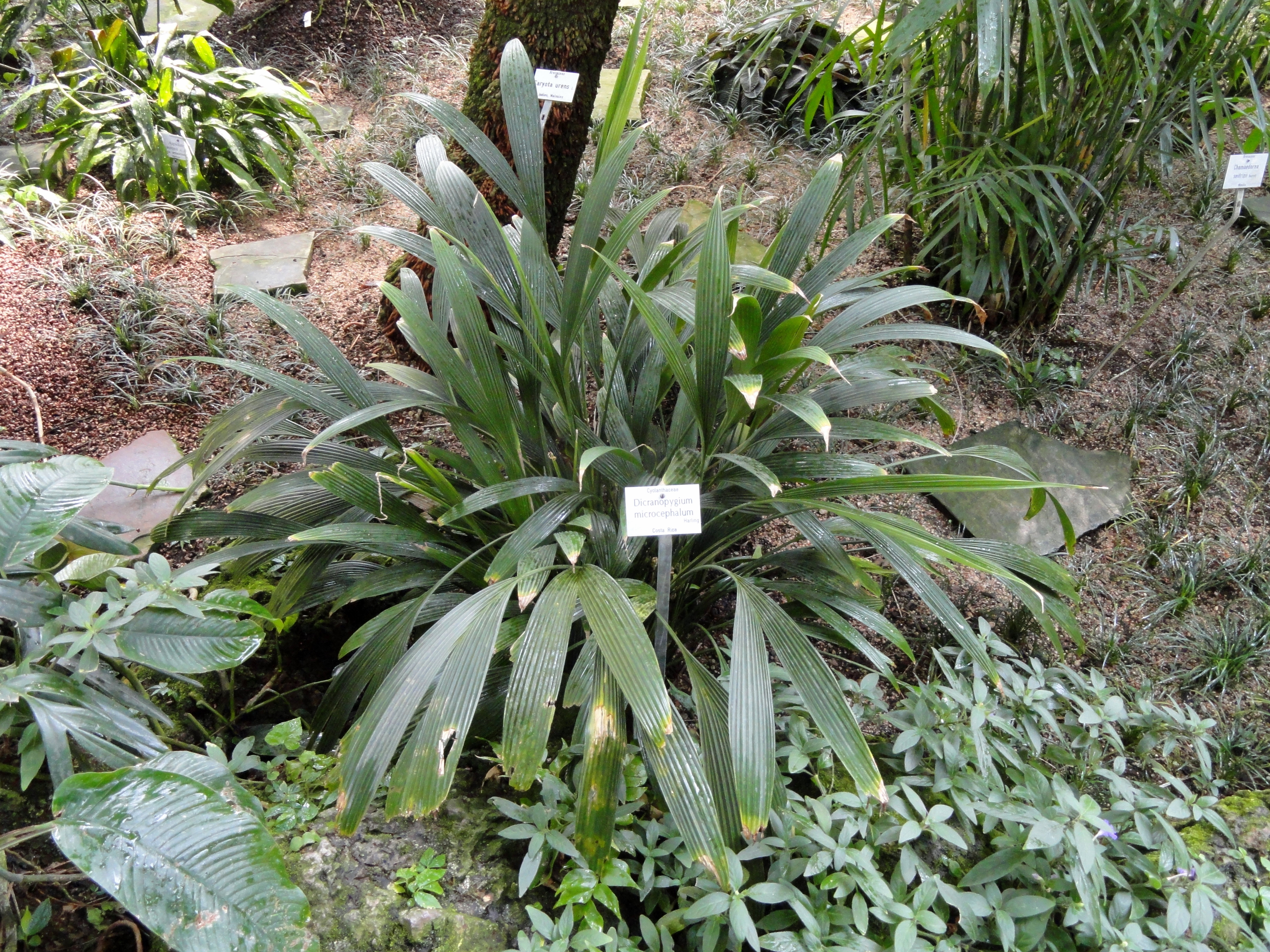 Dicranopygium microcephalum specimen in the Botanischer Garten München-Nymphenburg, Munich, Germany.